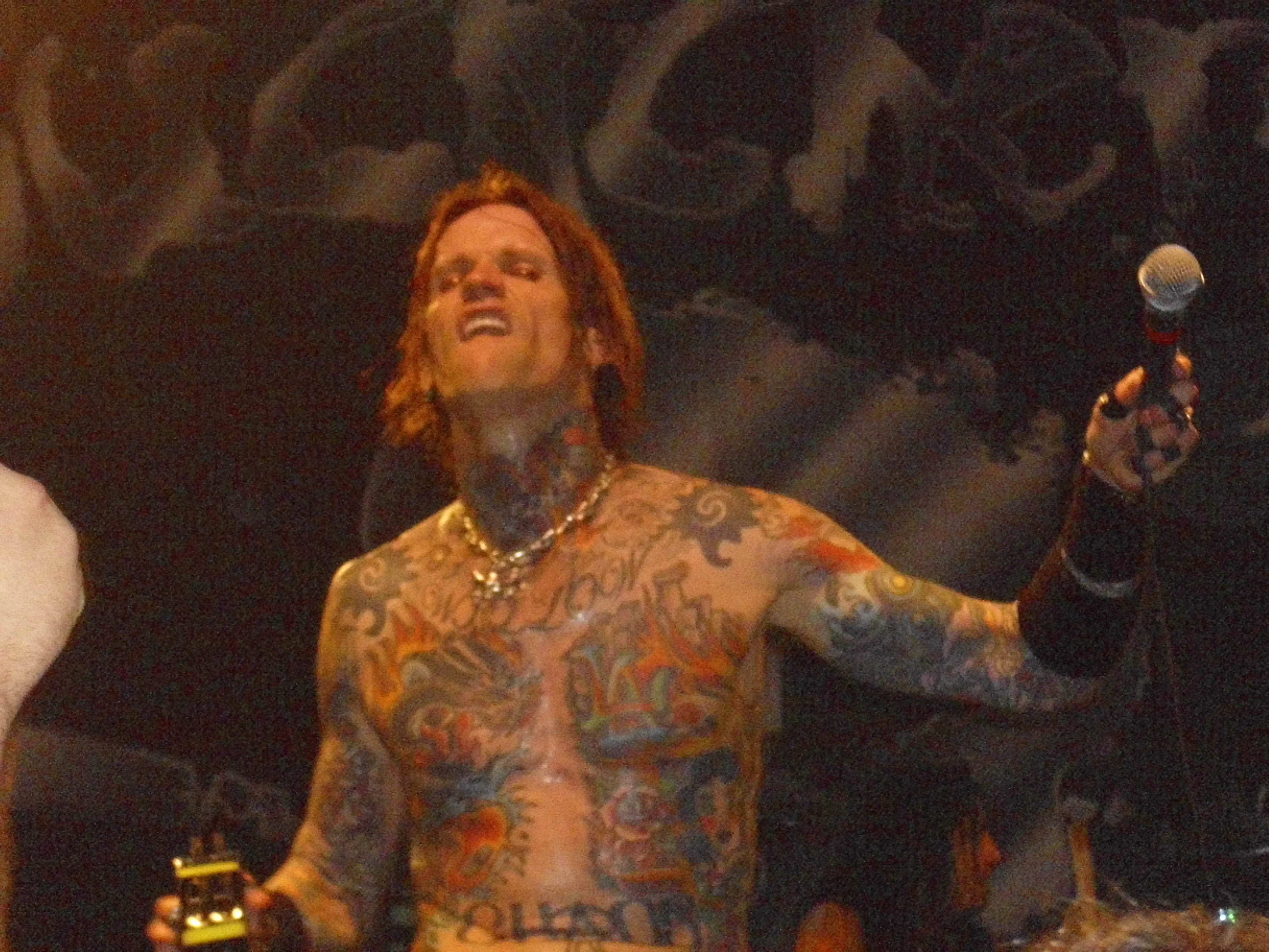 Buckcherry-Konzertfoto